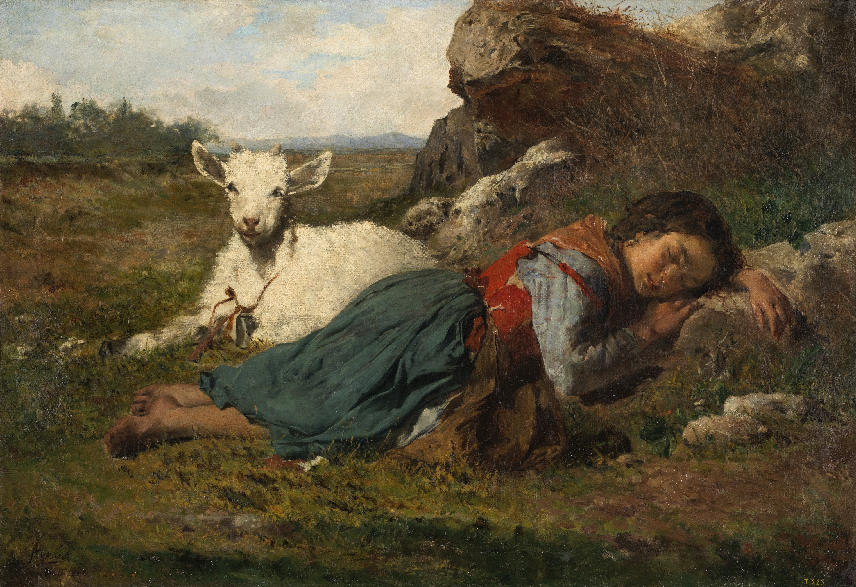 Las dos amigaslabel QS:Les,"Las dos amigas"label QS:Lfr,"Deux amis"